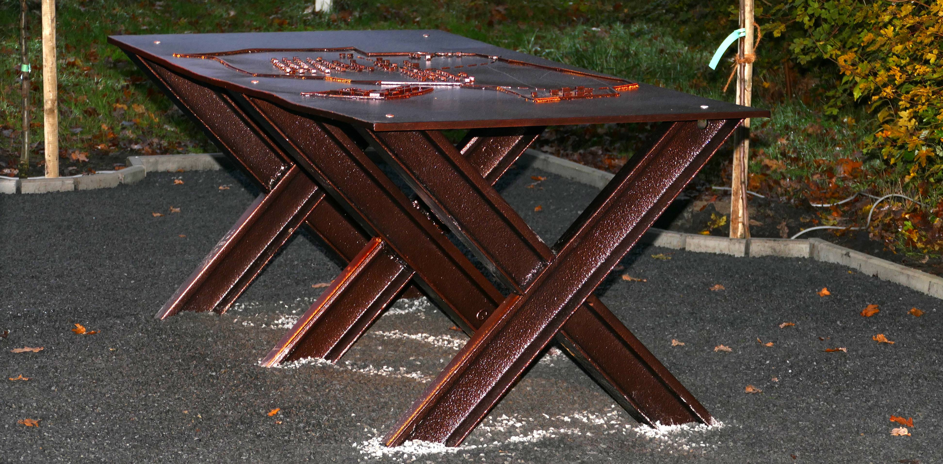 Mahnmal am Eingang zur Muna Lübberstedt, eingeweiht am 9. November 2019